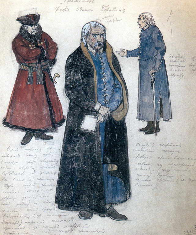 Франц Грильпарцер. Праматерь. Перевод Александра Блока. Эскиз костюма. Граф Зденко